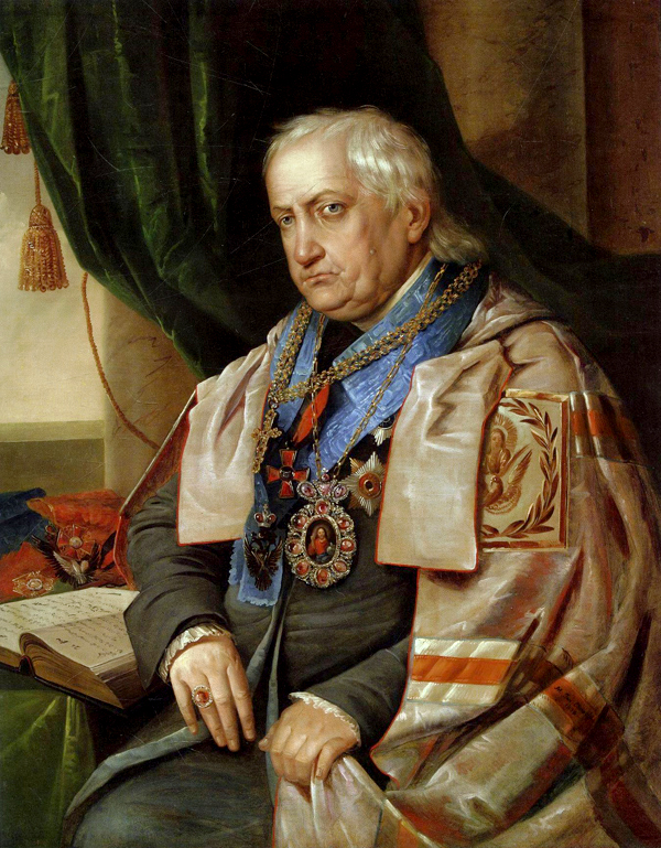 Партрэт Язафата Булгака. 1838г.Беларуская (тарашкевіца): Язафат Булгак